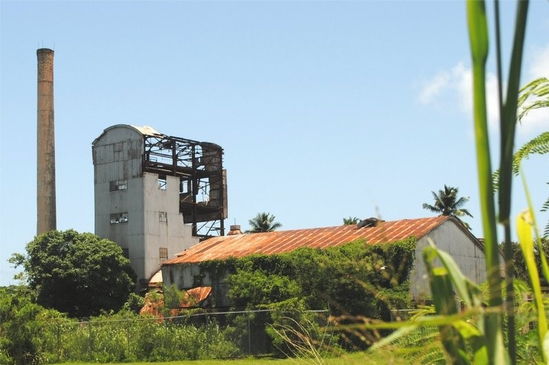 Ruinas de la Central Ríollano de Camuy, Puerto Rico